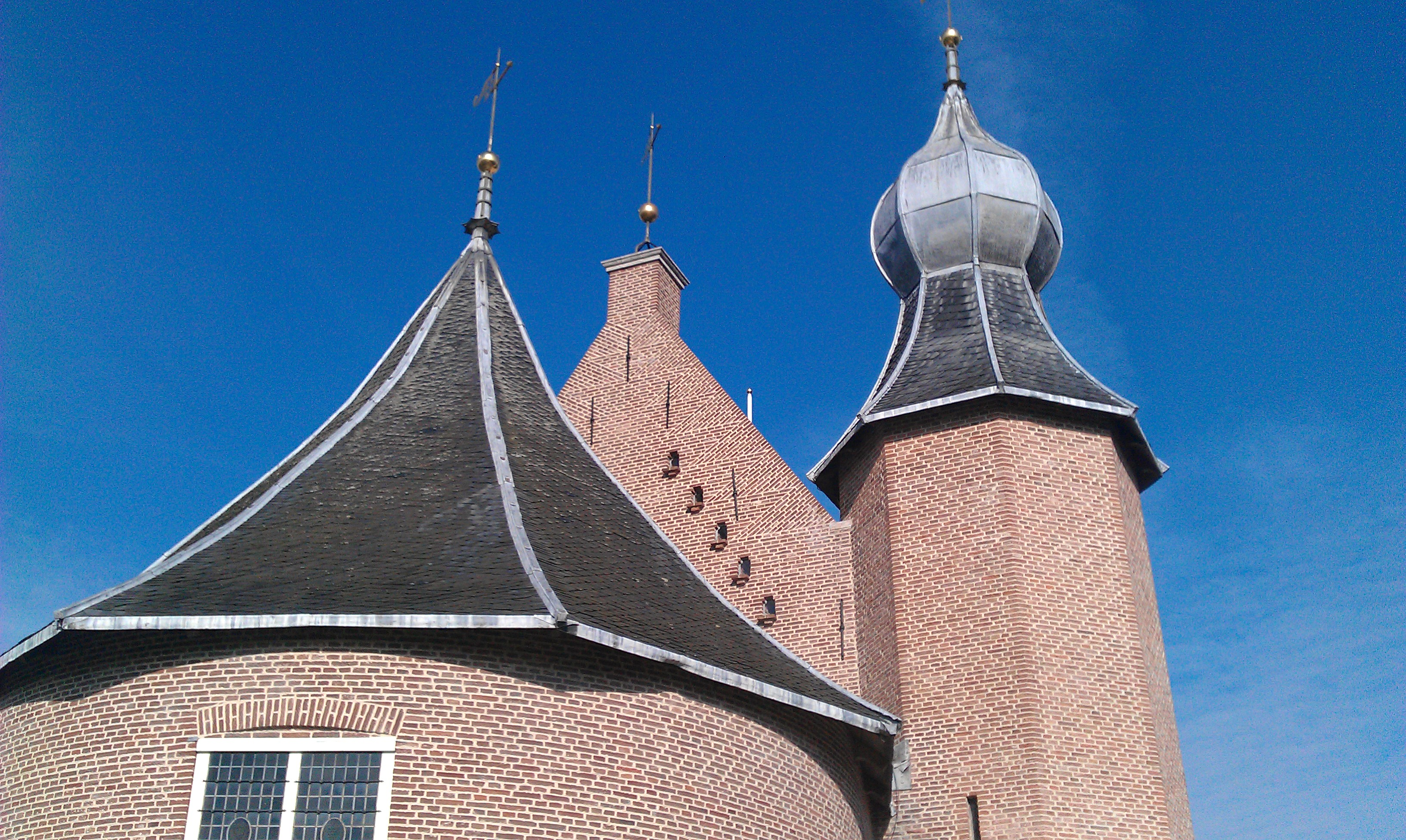 Kasteel van Coevorden.